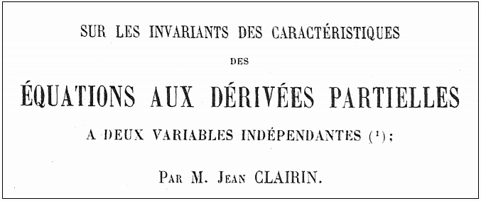 fronticipe de "Sur les invariants des caractéristiques des équations aux dérivées partielles à 2 variables indépendantes